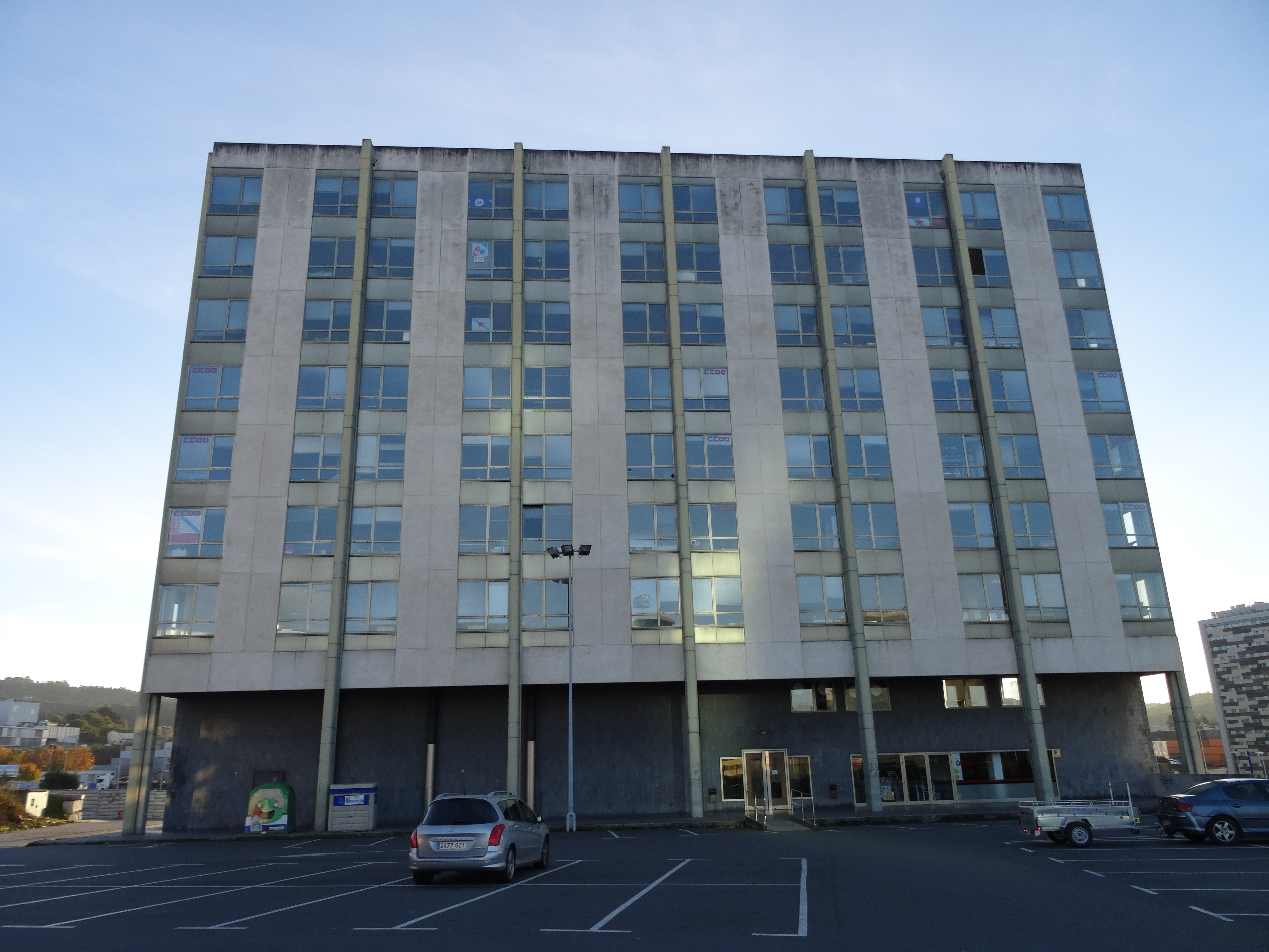 Ver título.